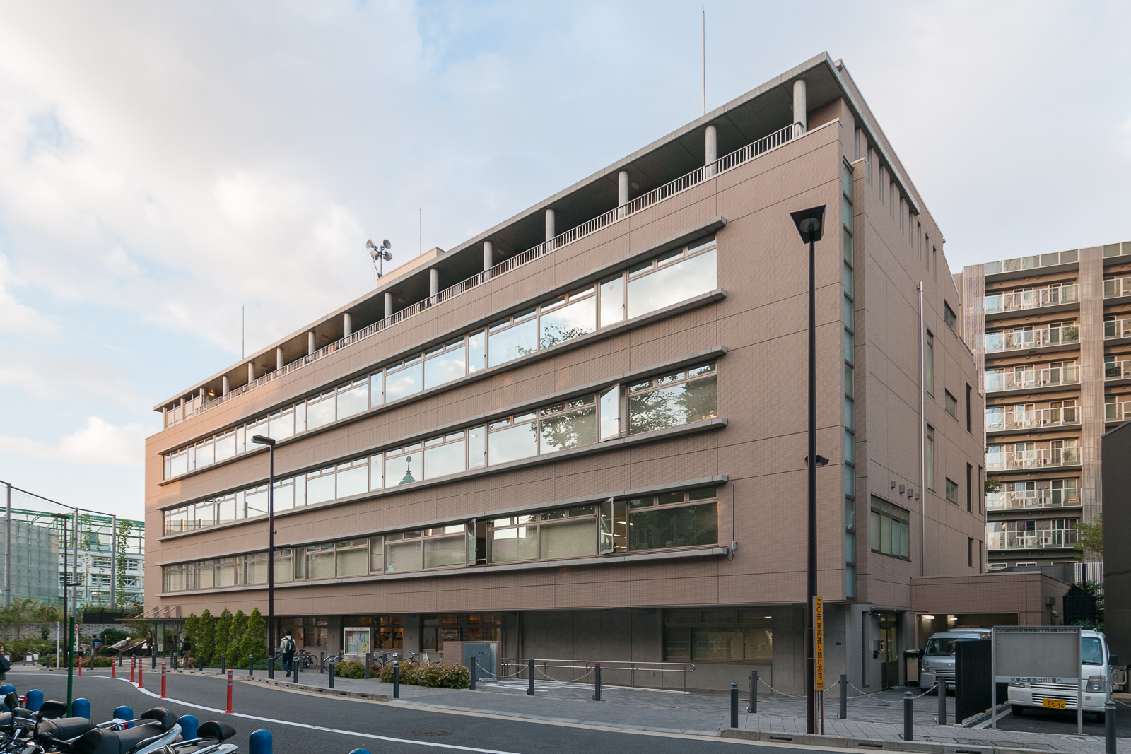 渋谷区立中央図書館、東京都渋谷区神宮前1丁目。